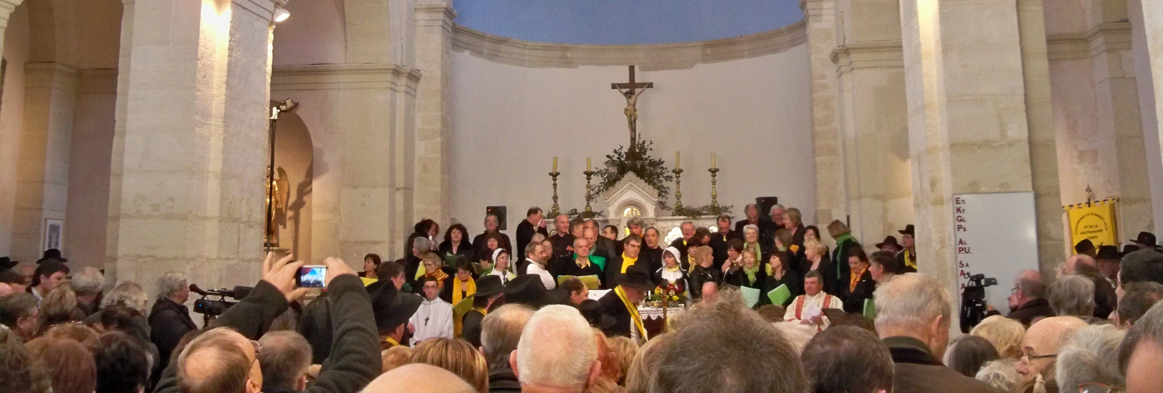 messe aux truffes de Richerenches, Vaucluse, France